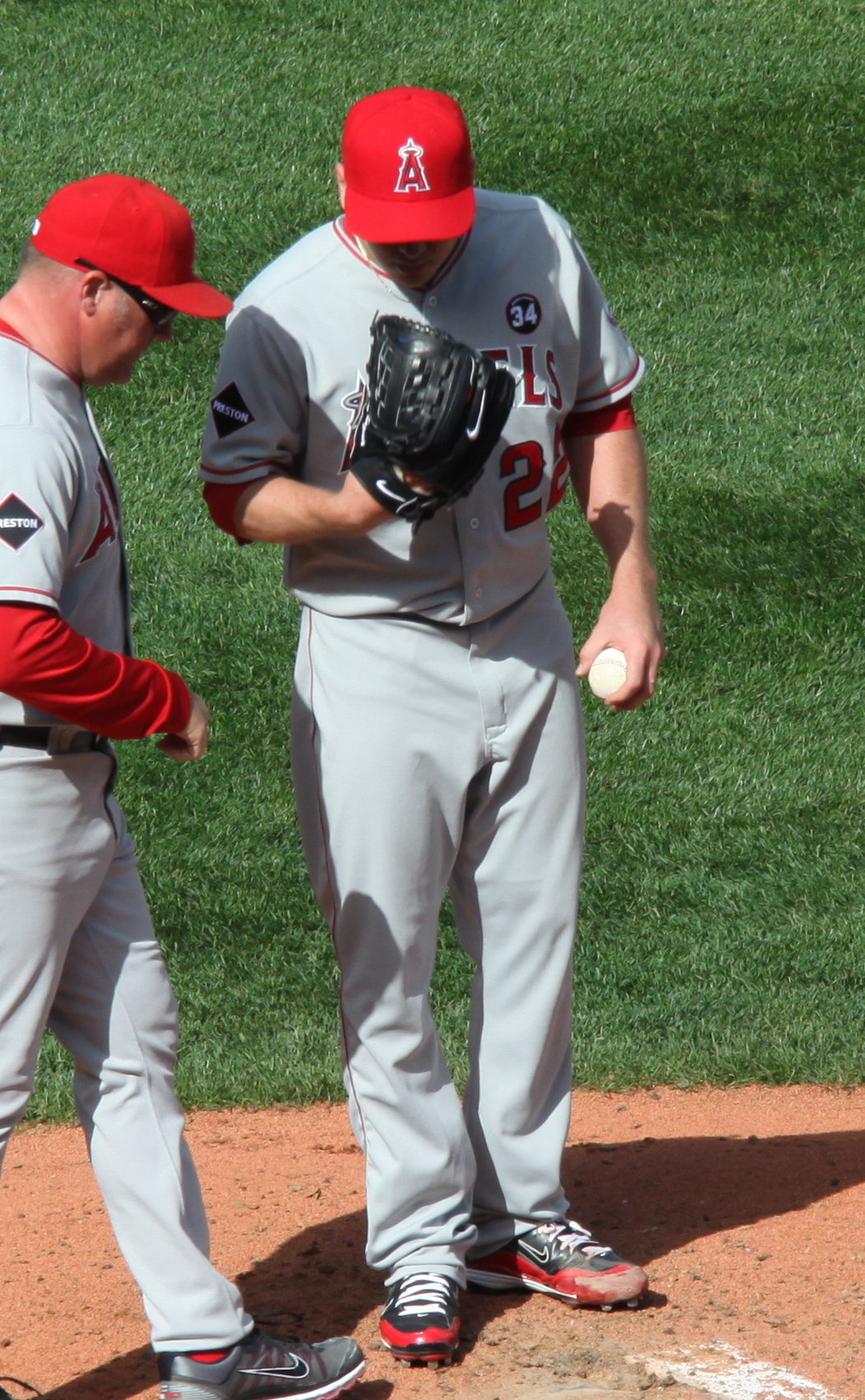 Scott Kazmir